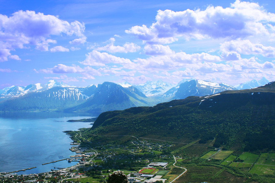 Hareid nede i venstre hjørne, Sunnmørsalpene i bakgrunnen.